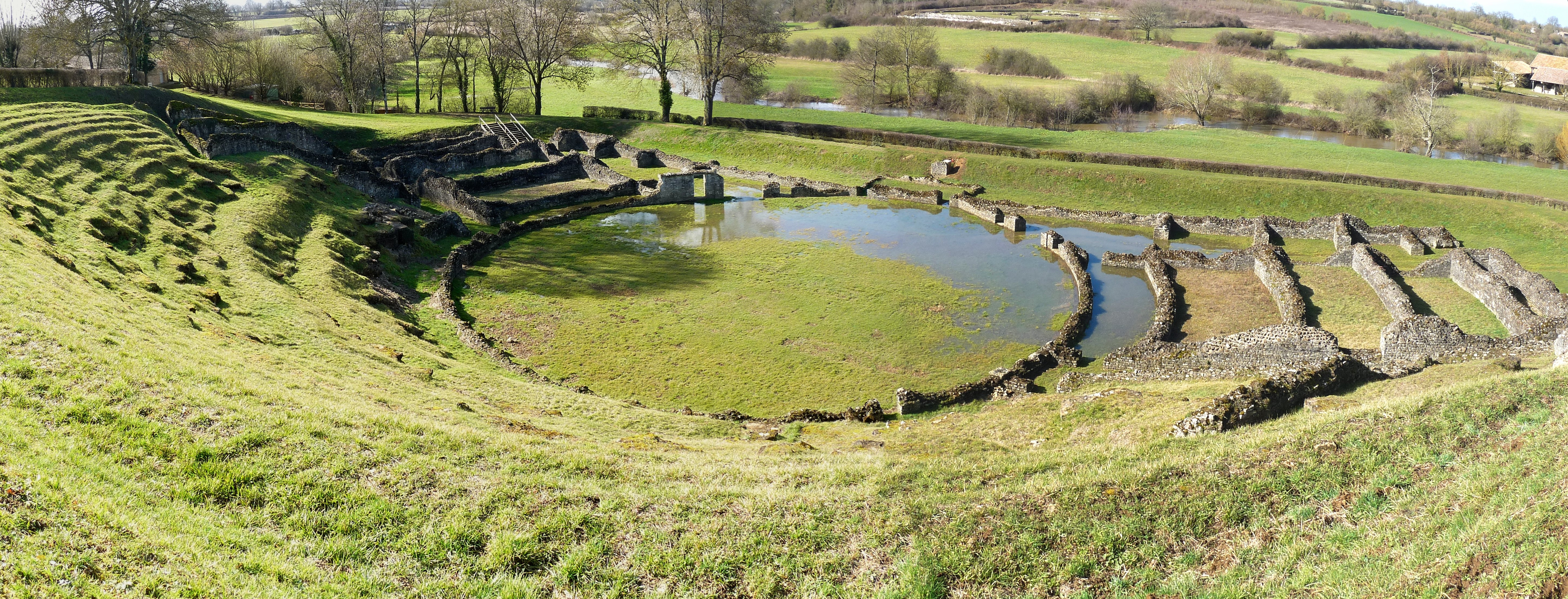 Théâtre Gallo-Romain de Sanxay .